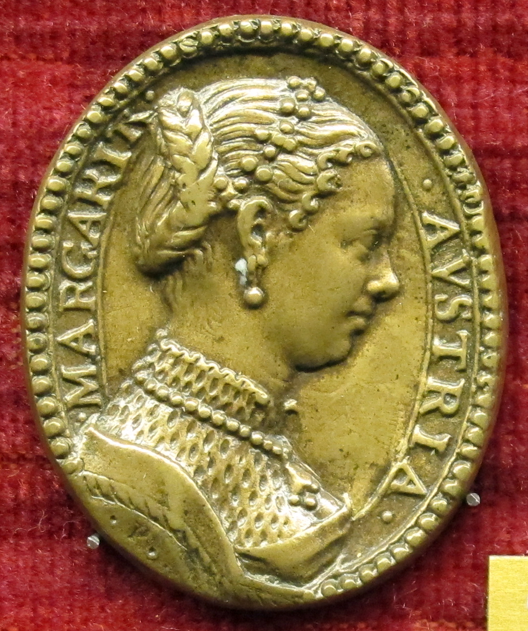 Pastorino, medaglia di margherita d'austria